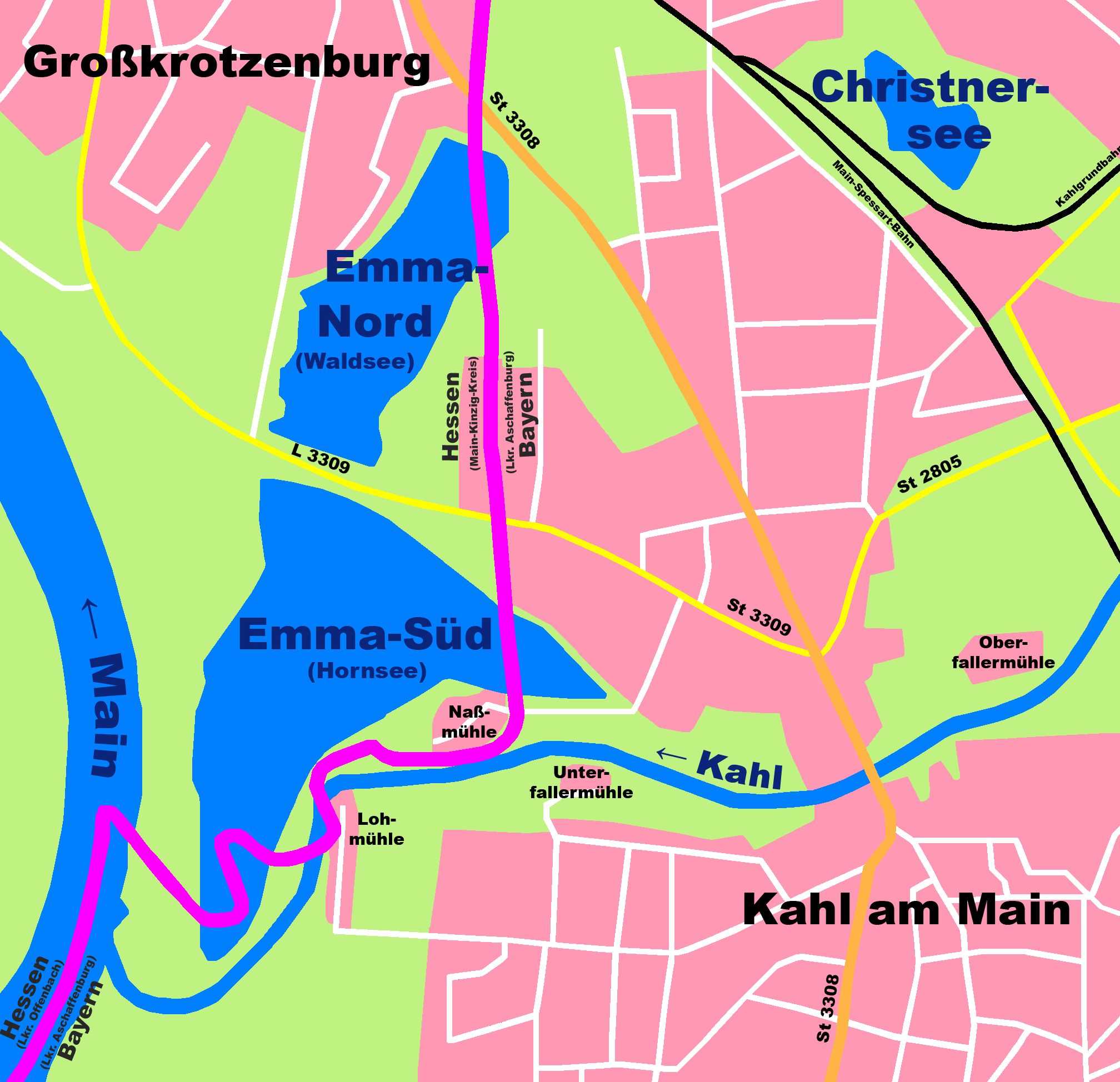 Karte der Emmaseen bei Kahl am Main in Bayern und Großkrotzenburg in Hessen Siedlungsfläche Wald und Grünfläche Gewässer Landesgrenze Hauptstraße Bahnlinie